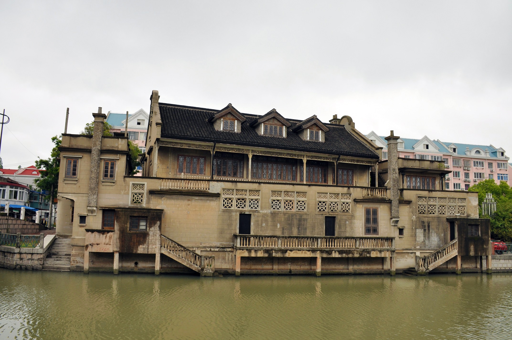 高桥仰贤堂 高桥镇义王路1号 高桥镇东街81-93号 1933年